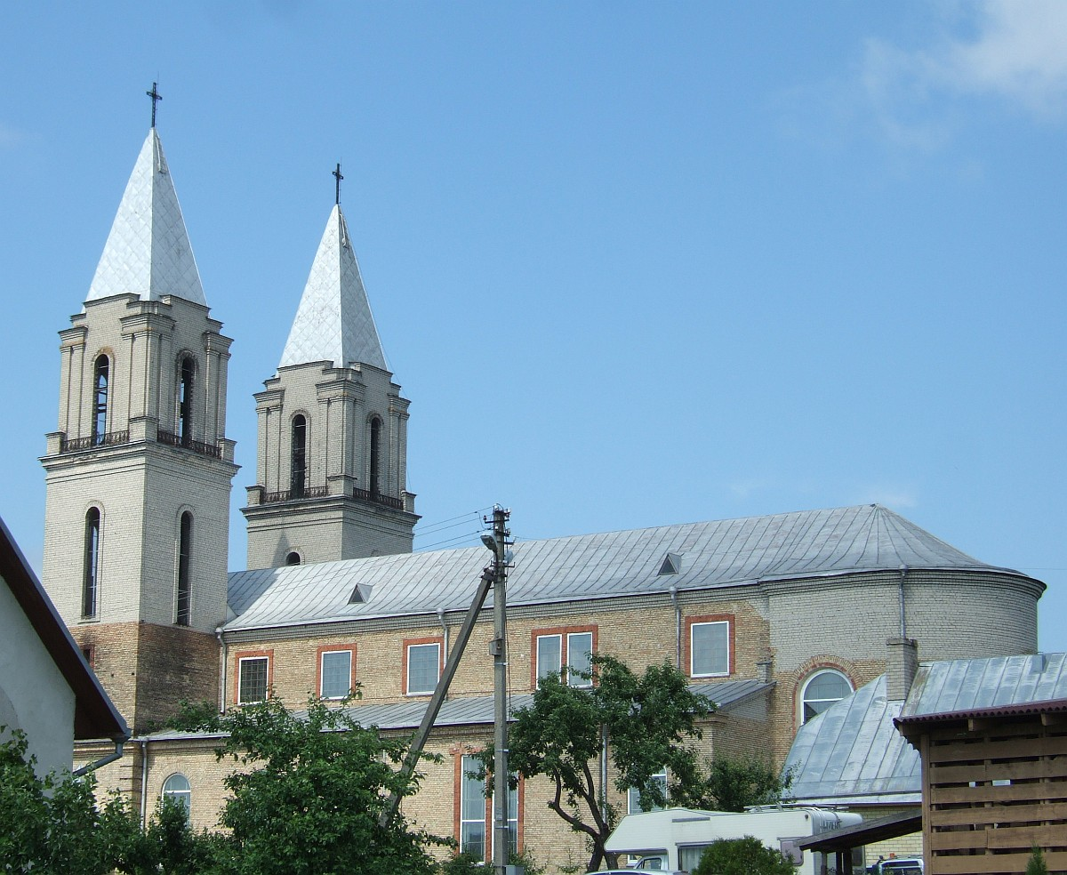 Švenčionėlių Šv. Edvardo bažnyčia